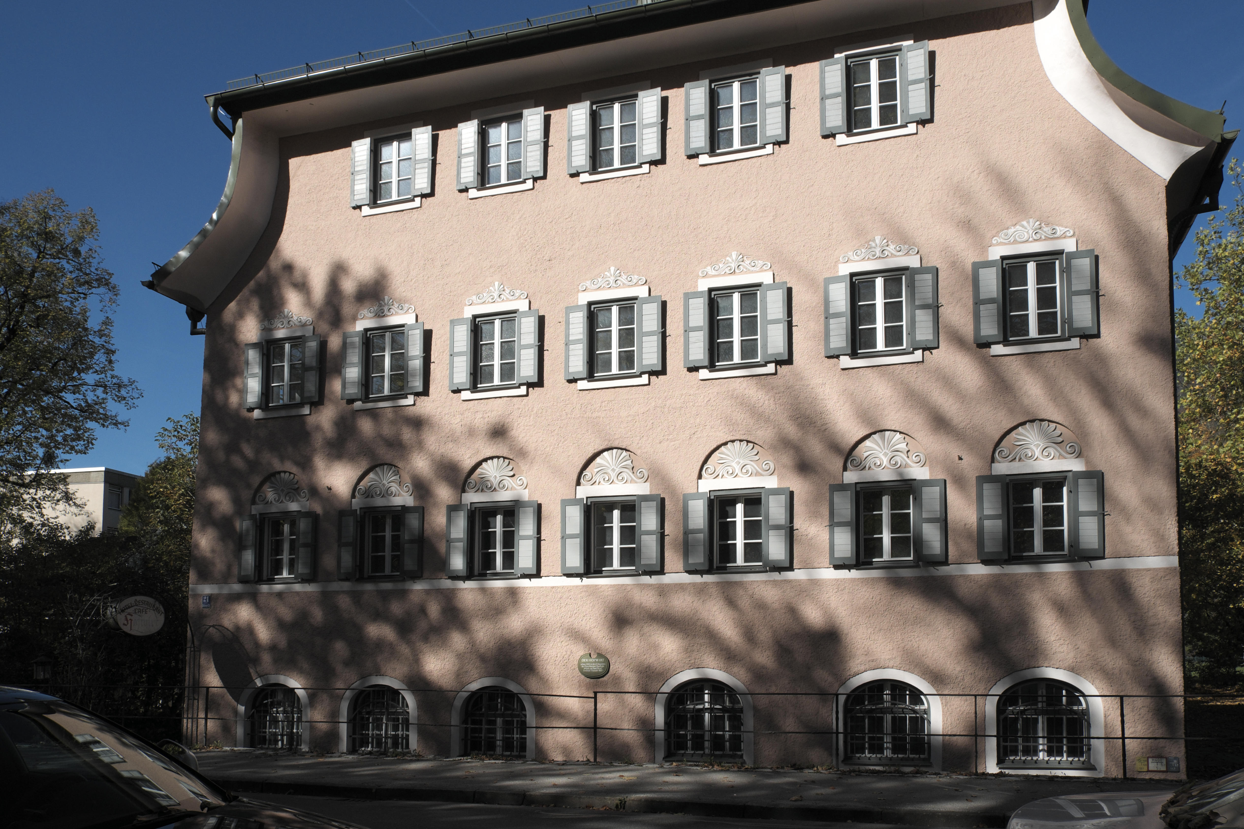 Gasthof Hofwirt in Bad Reichenhall im Landkreis Berchtesgadener Land (Bayern/Deutschland)